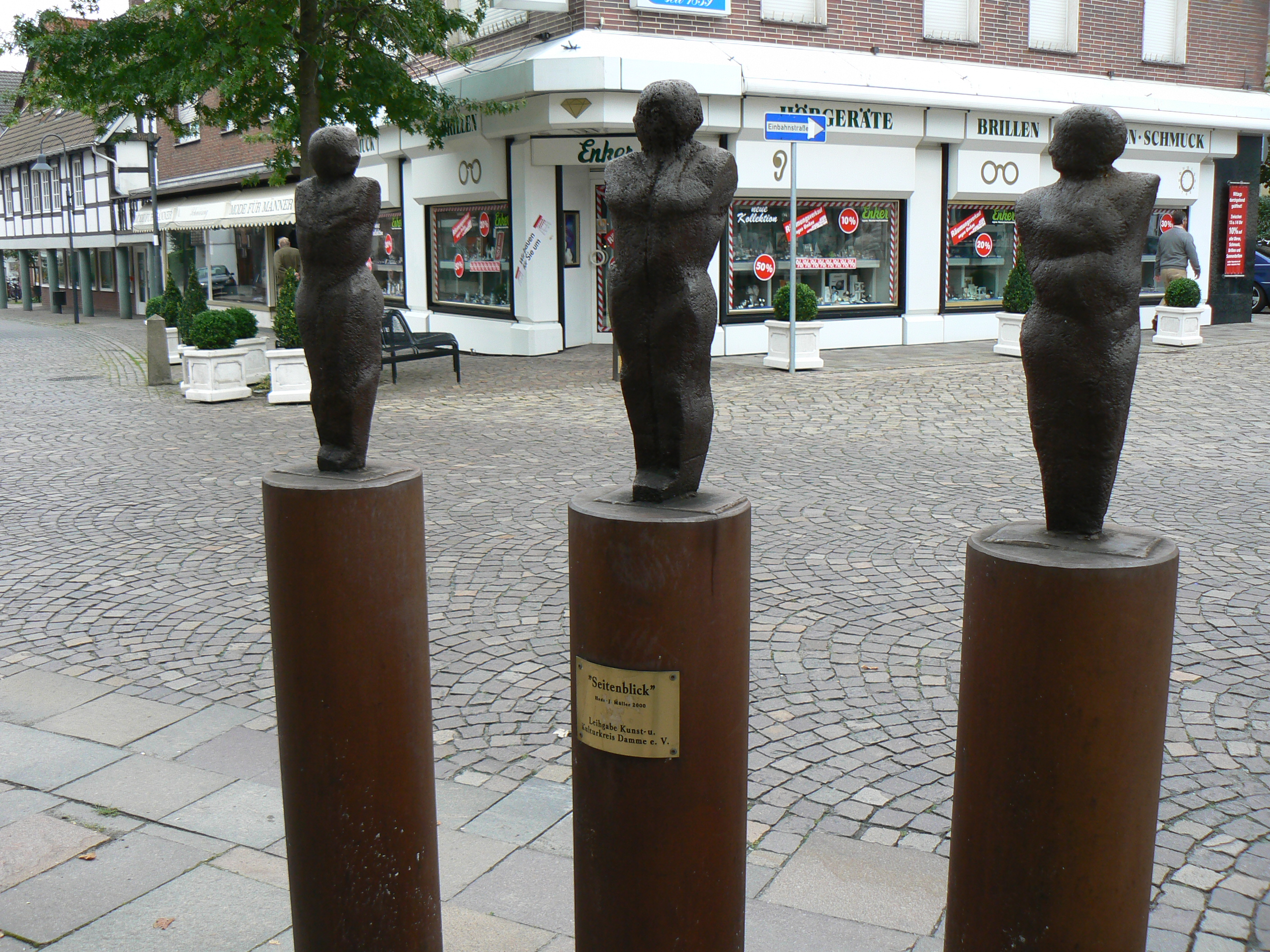 sculpture Seitenblick 2000 by Hans J. Müller in Damme/Germany